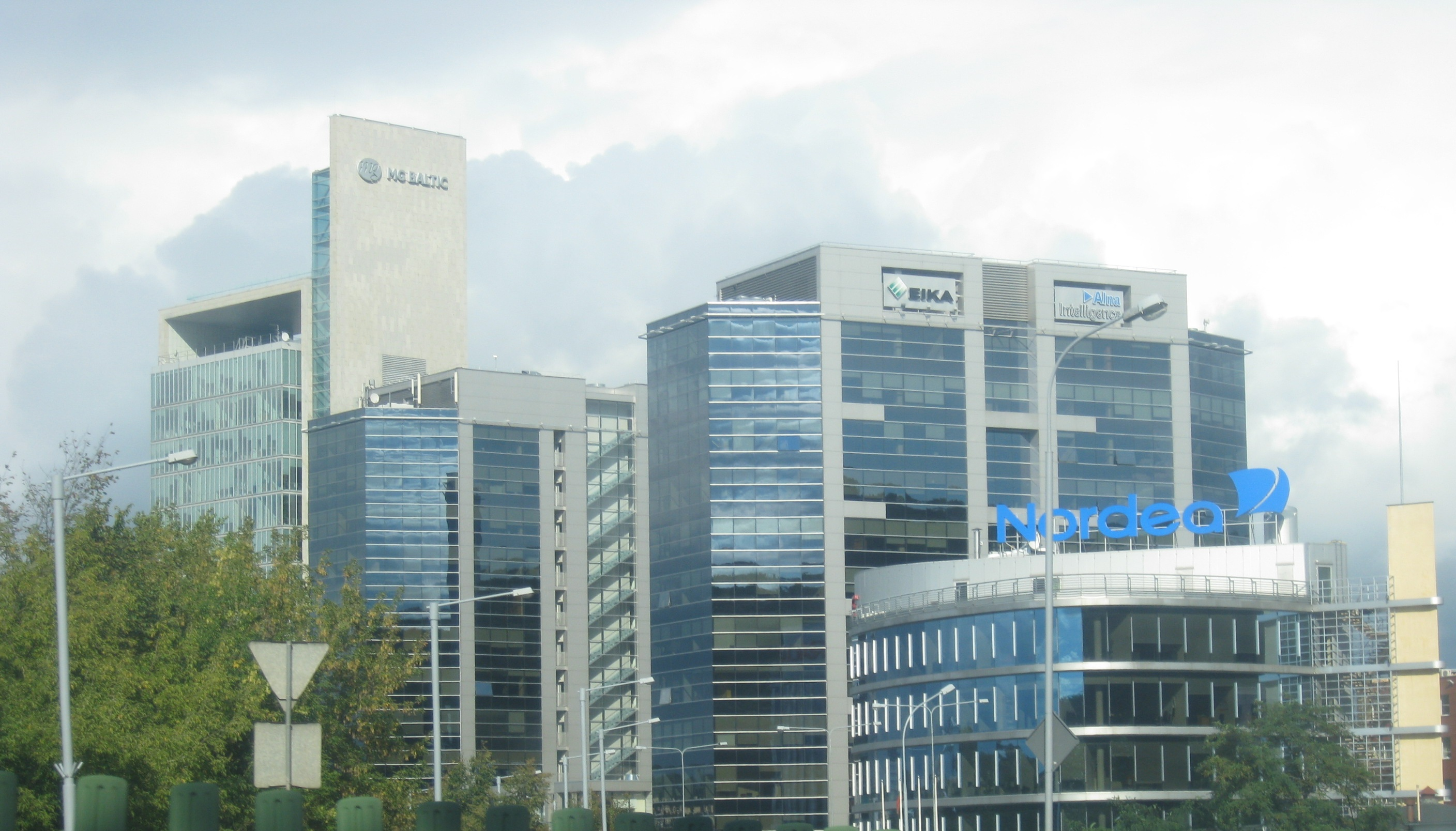 Nordea Bank Lietuva